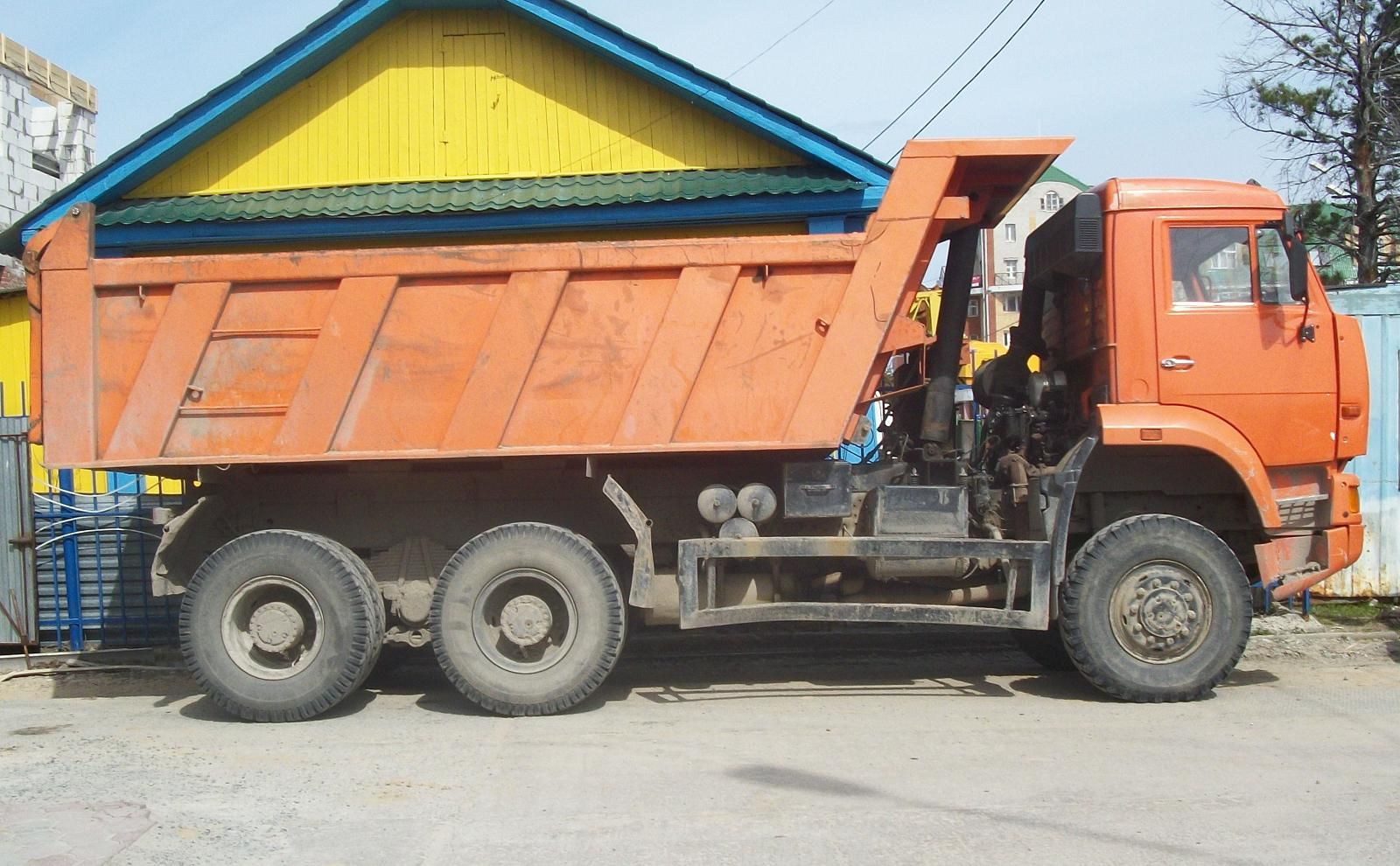 Камаз-6522, г. Ханты-Мансийск